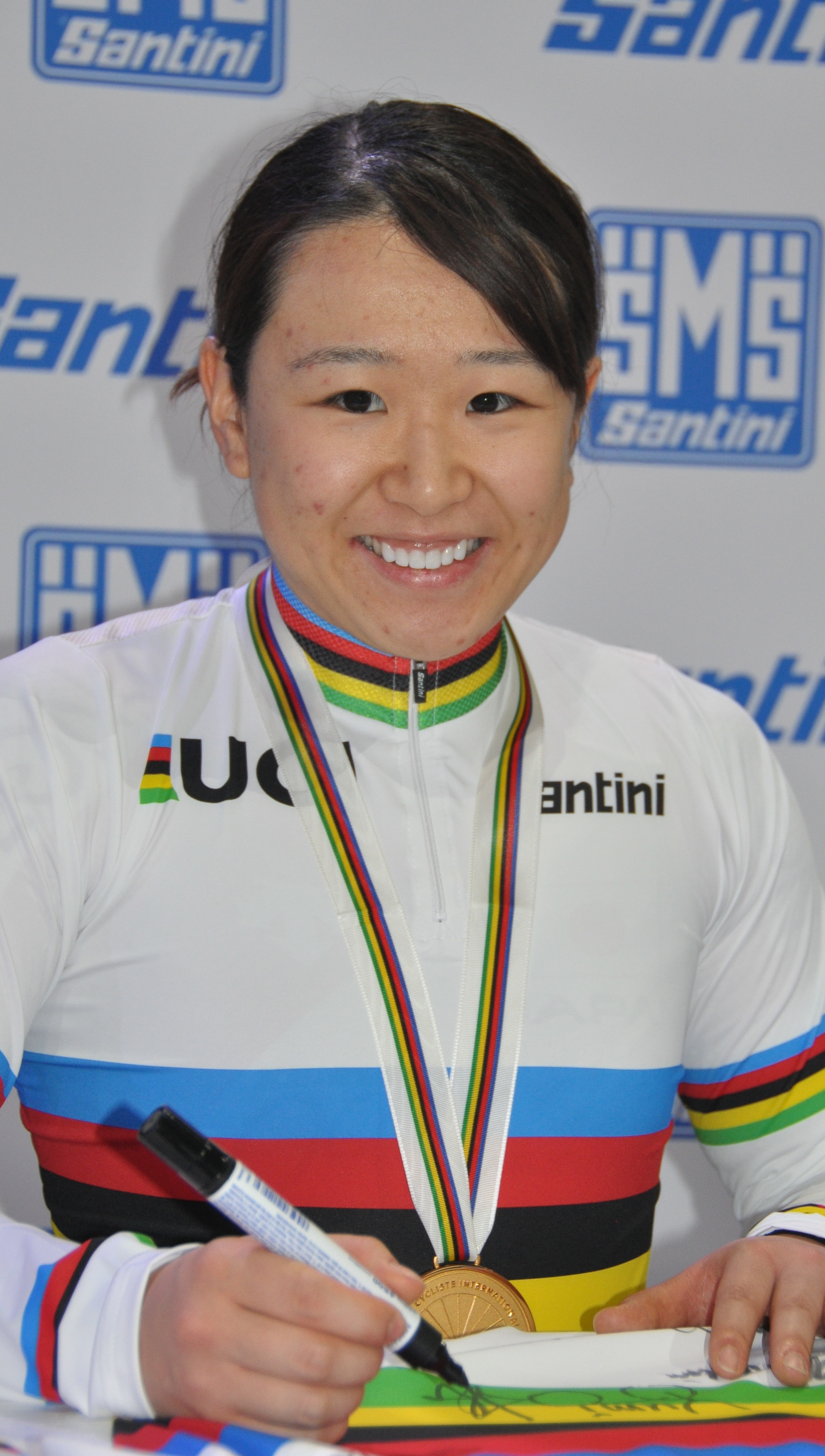 Yūmi Kajihara, Radsportlerin aus Japan - Weltmeisterin im Omnium 2020